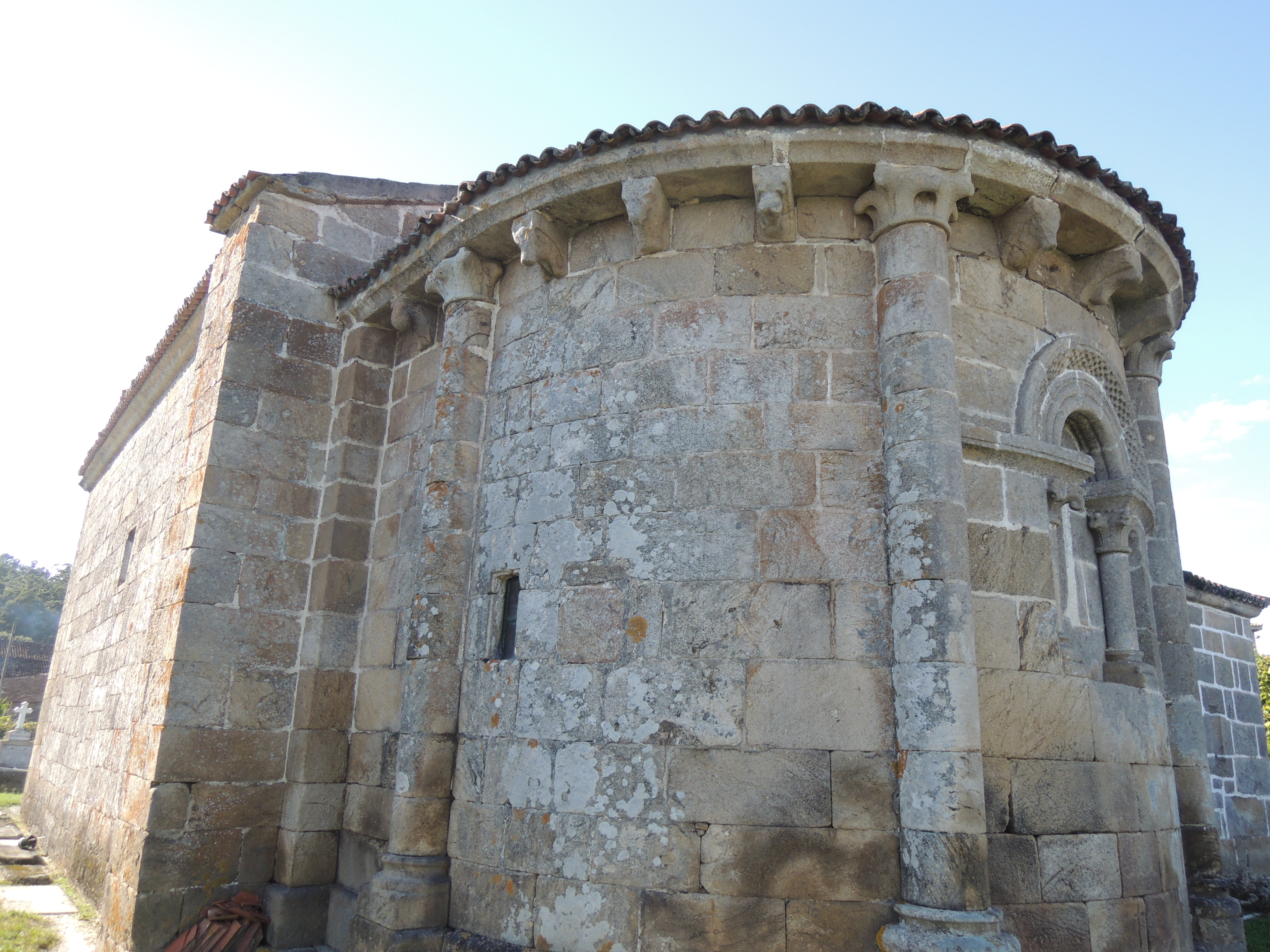 Iglesia de San Martiño de Riobó